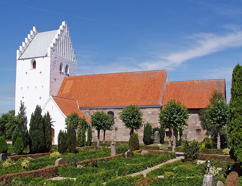 Hundslund Kirke Hads Herred, Århus Amt, Denmark